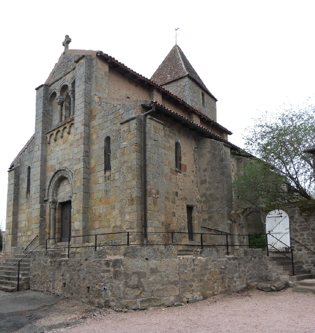 Église Saint-Laurent (Inscrit) .